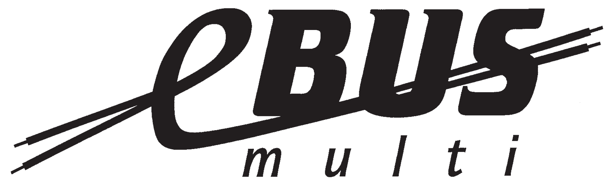 Logo des Bussystems eBus